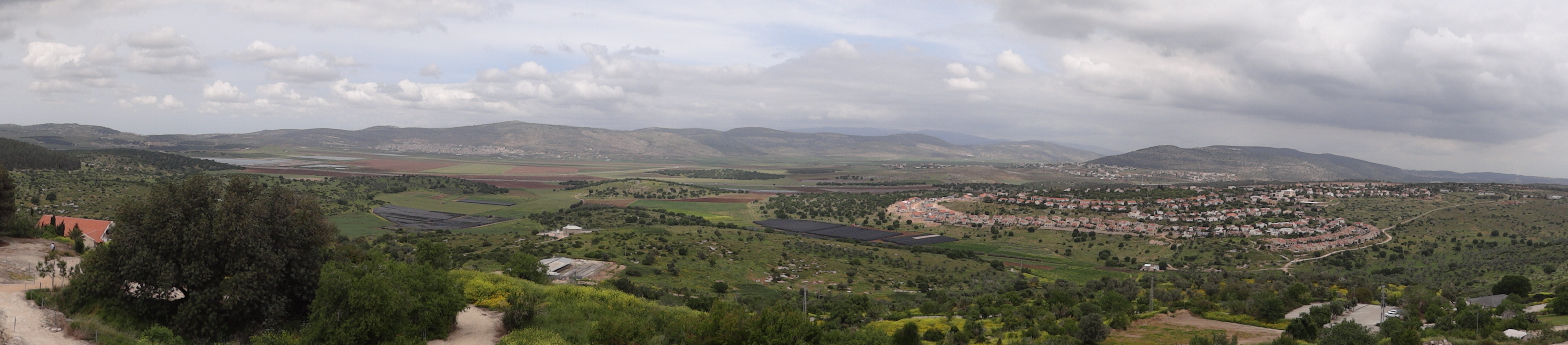 Beit Netofa valley', Israel בקעת בית נטופה בגליל, ישראל מימין מצפה הושעיה, משמאל בקעת בית נטופה